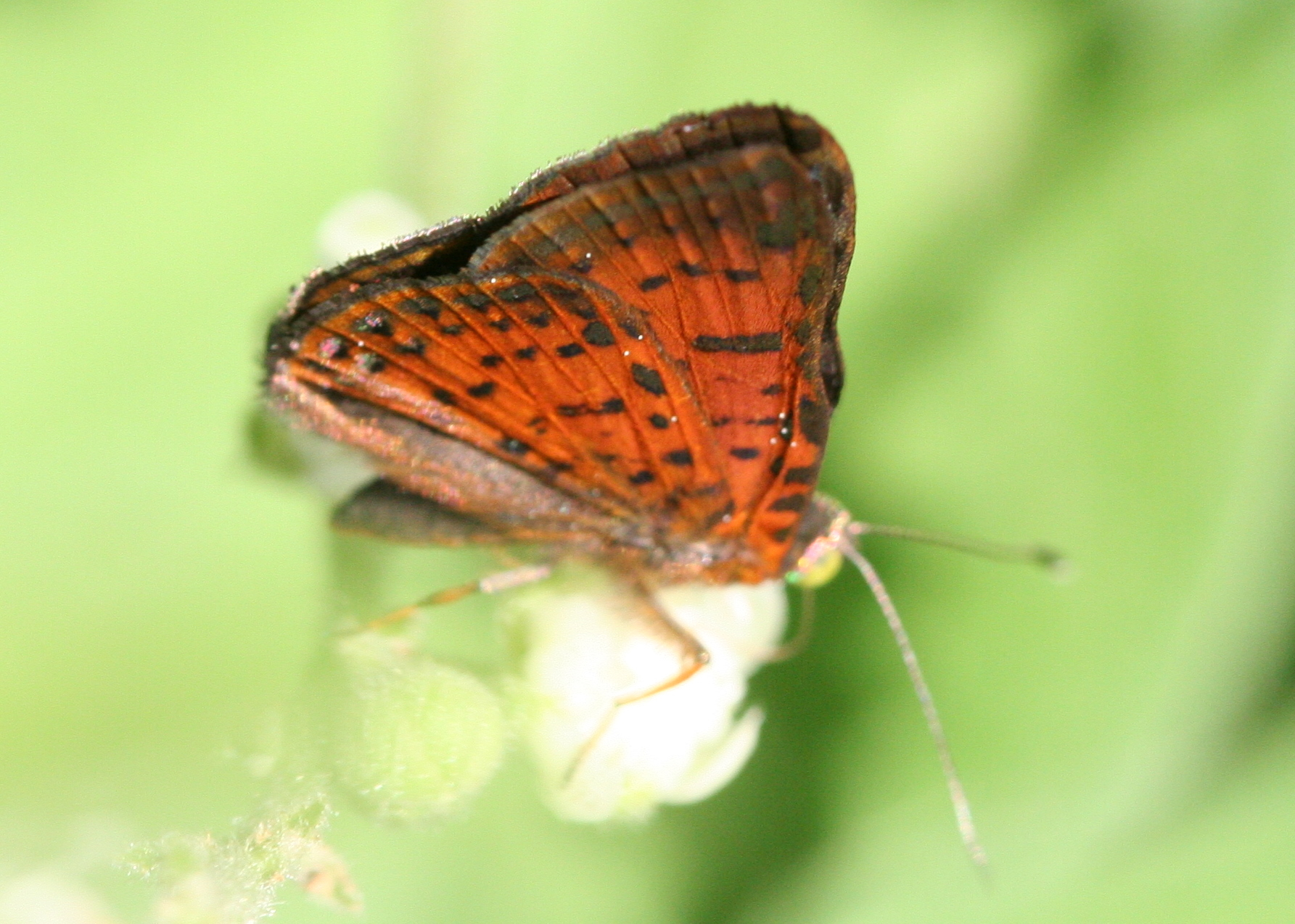 Red-bordered metalmark (Caria ino) female ventral